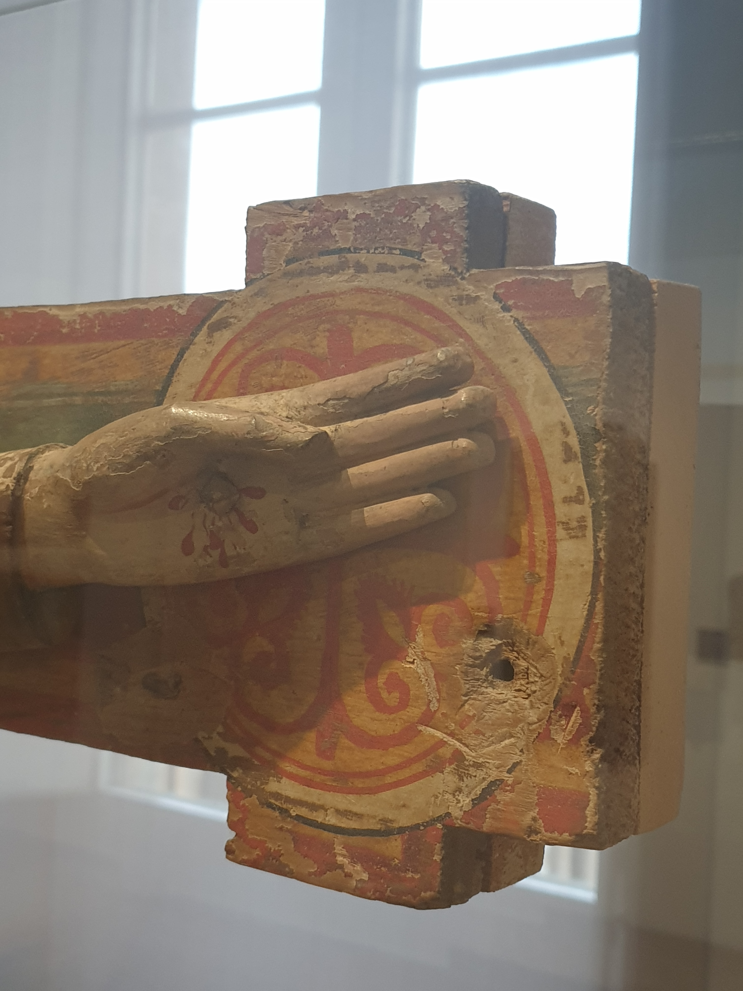 Crist en Majestat, monestir Sant Miquel de Cruïlles, exposat al Museu d'Art de Girona